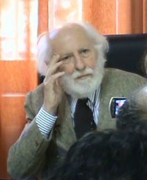 primo piano Pagliara